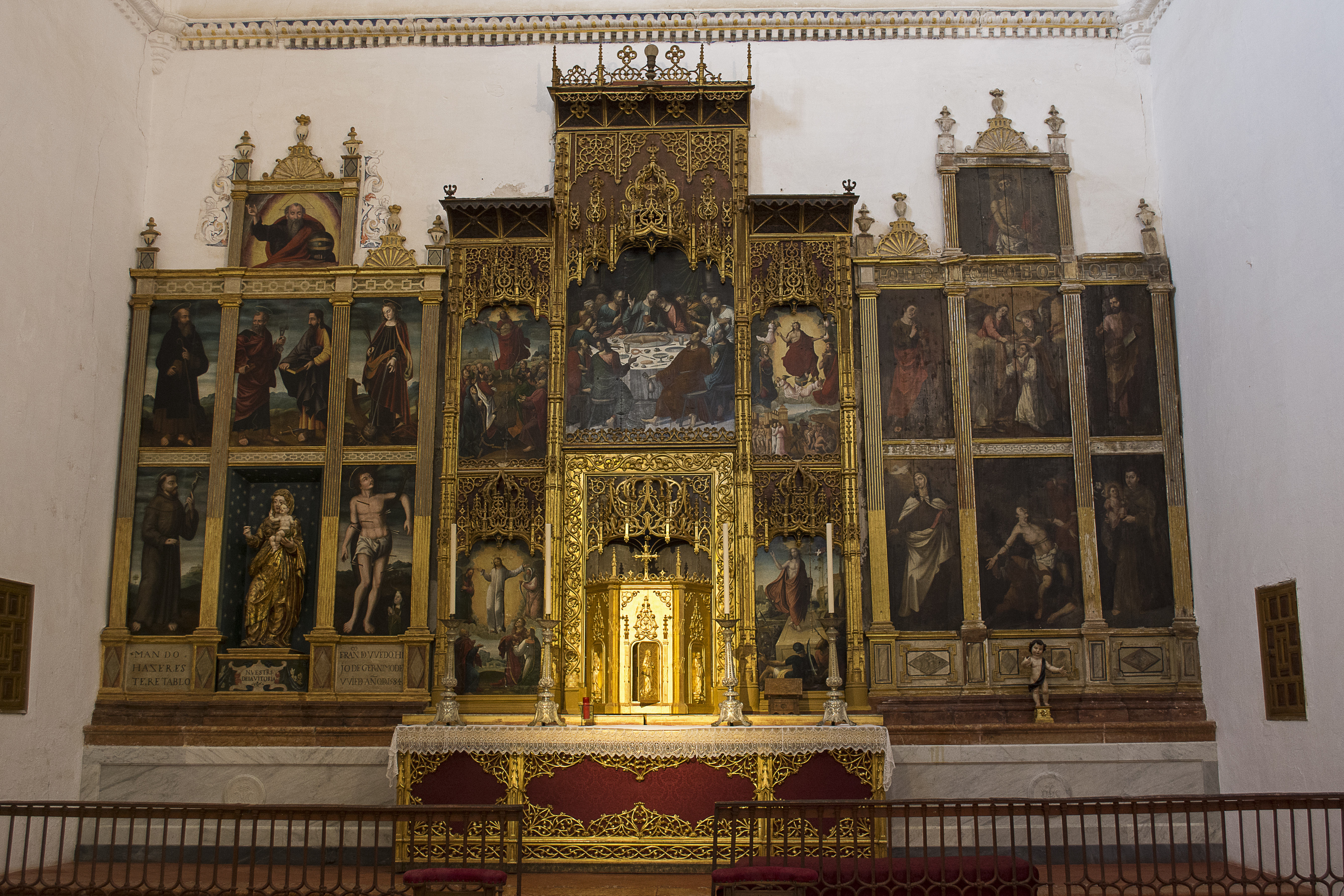 Capilla de la cabecera de la nave del evangelio de la Colegiata de Osuna. Pinturas de Juan Bautista de Amiens y Juan de Zamora